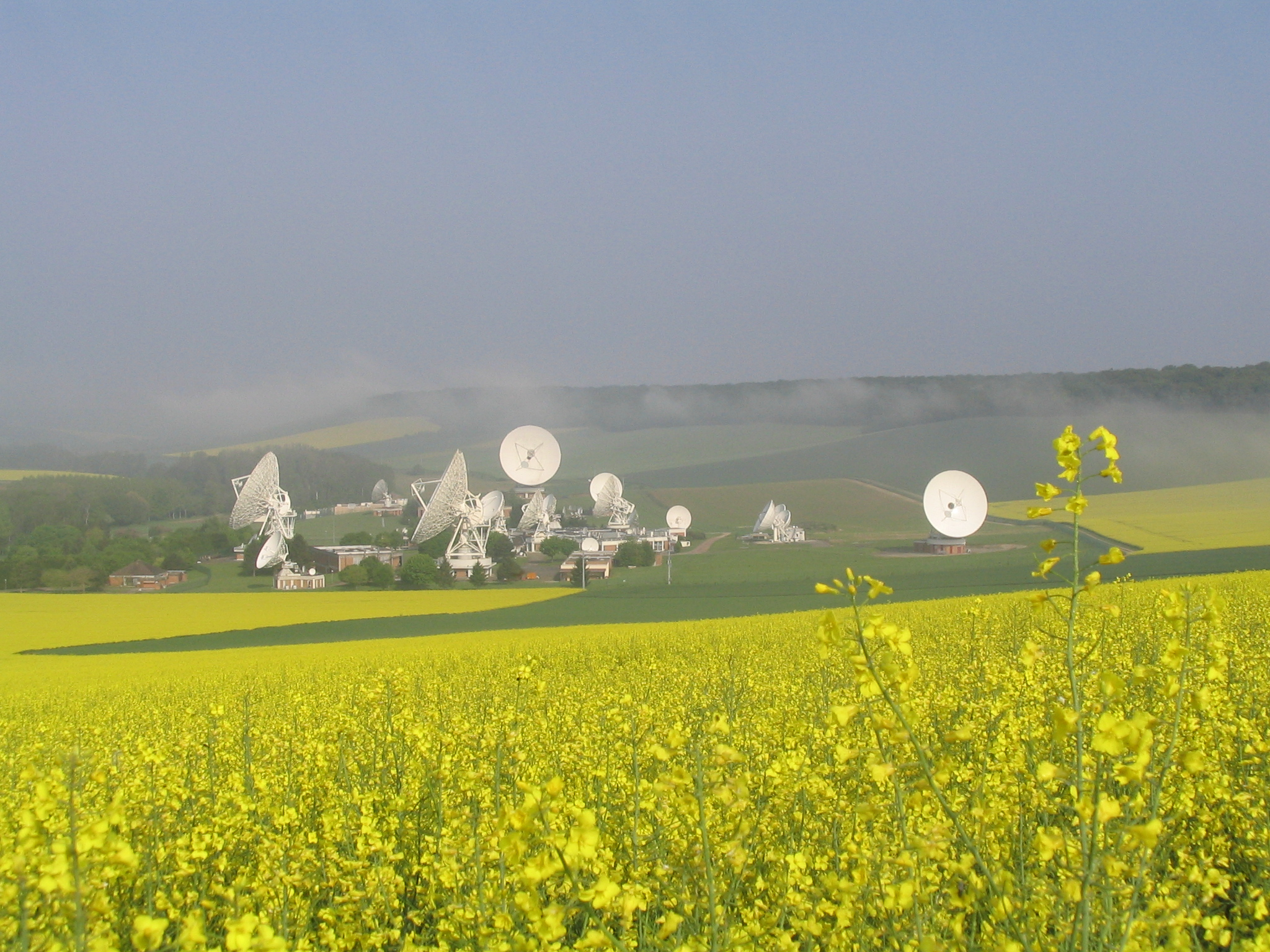 Centre spatial de télécommunication